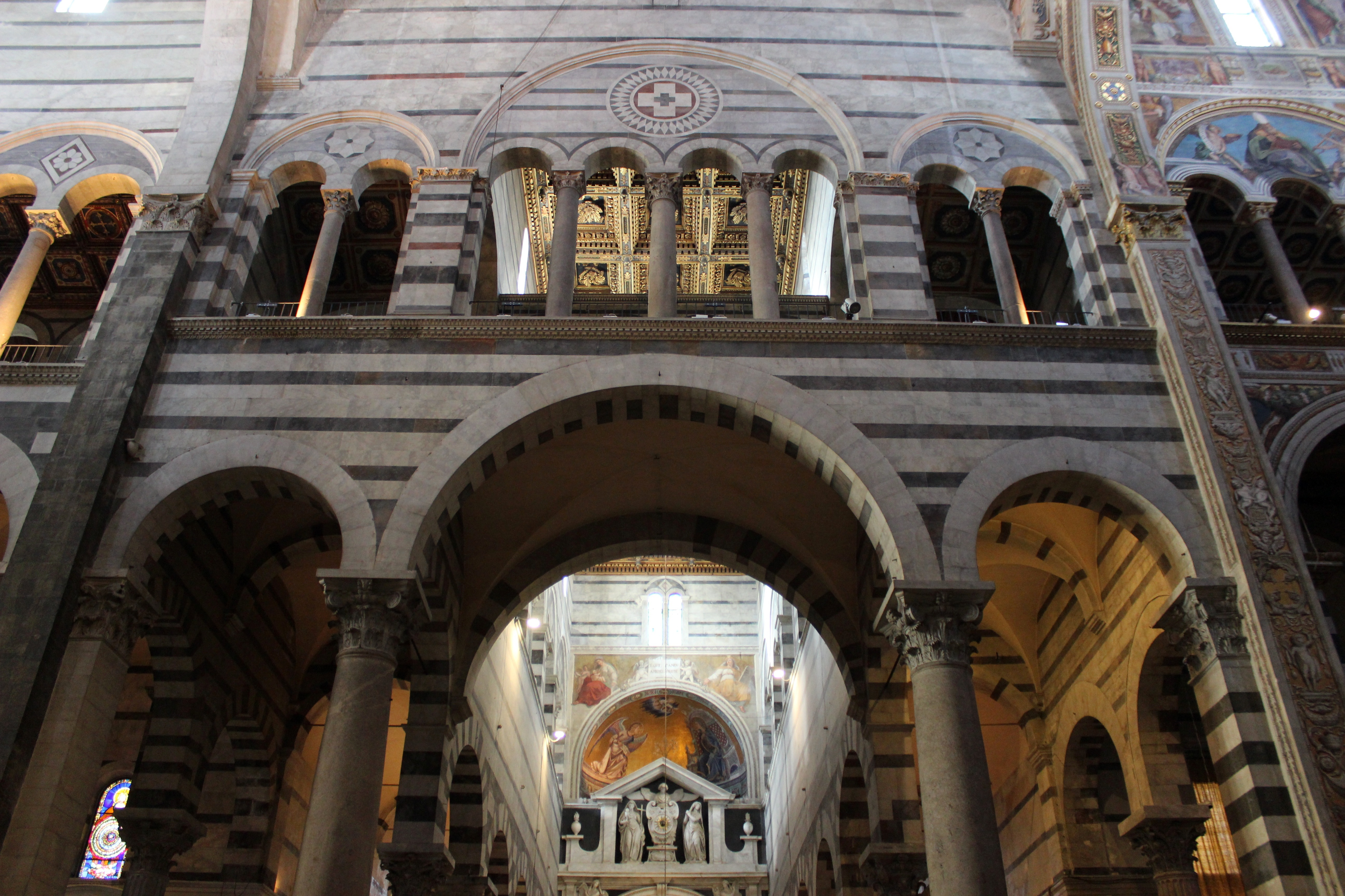 Catedral de Pisa. Capilla del Santísimo.